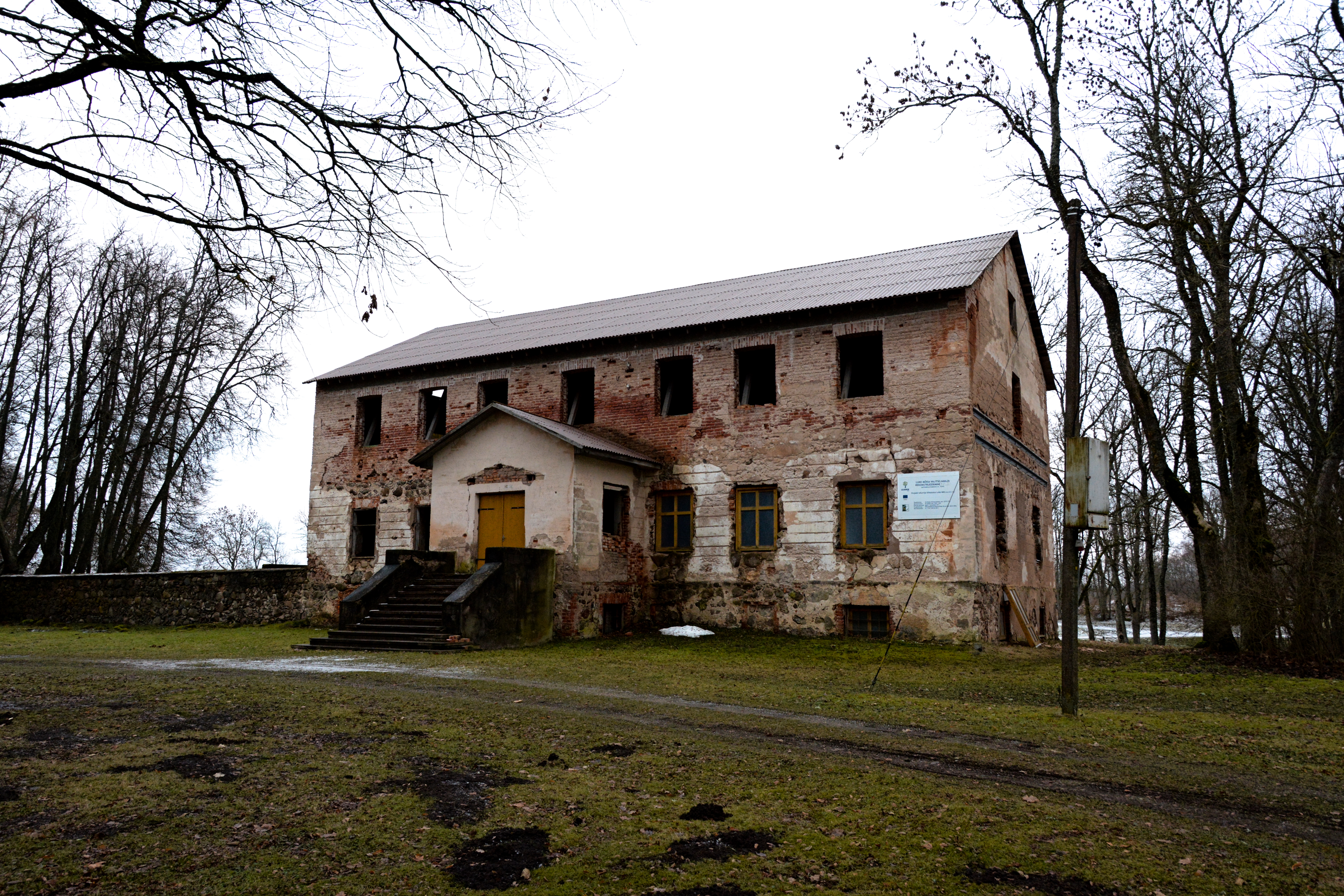 Luke mõisa valitsejamaja 2018. aastal